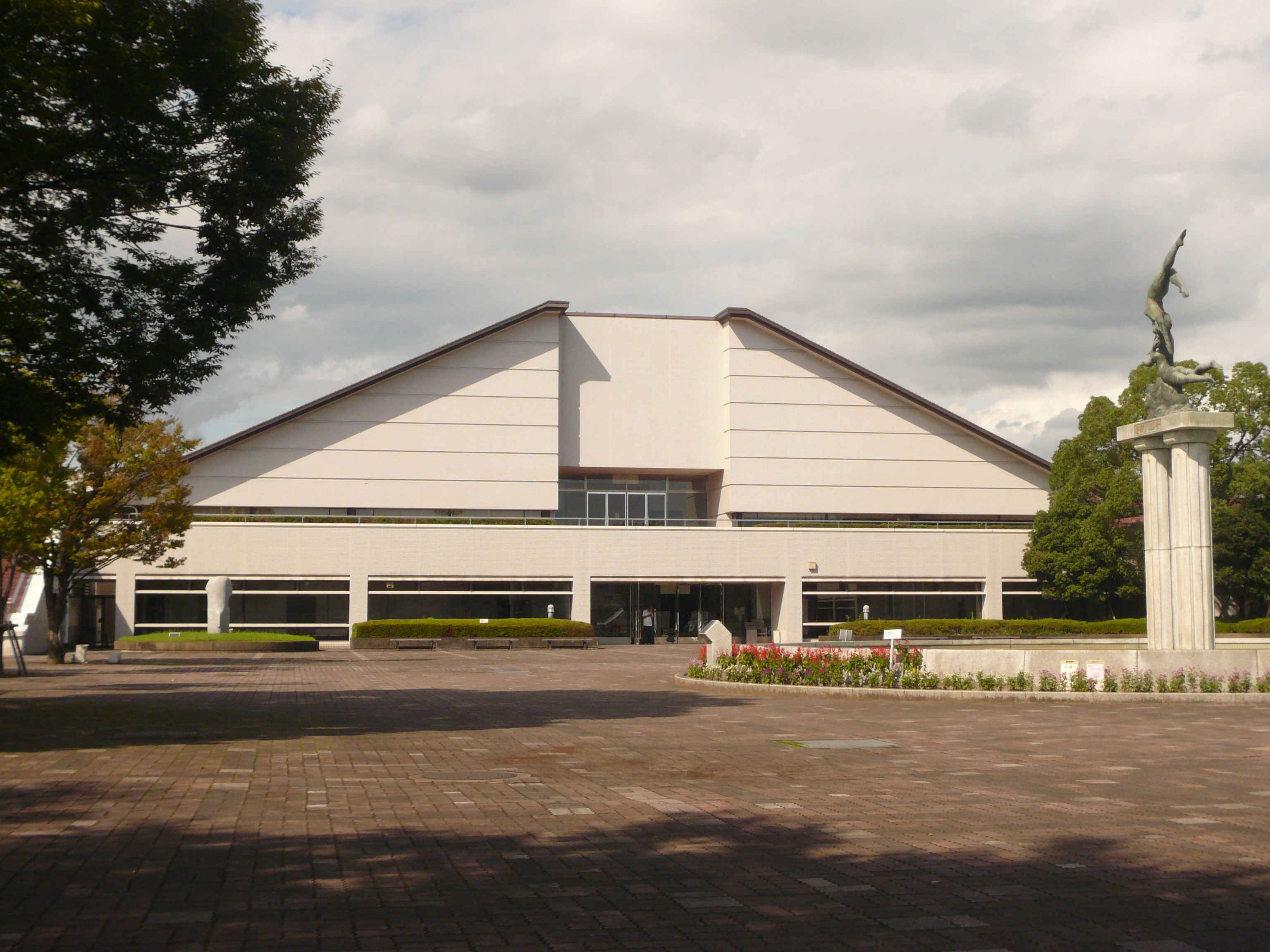 Gifu Memorial Center Marshal Arts Gymnasium（岐阜メモリアルセンター）,Gifu,Gifu(岐阜県岐阜市)で撮影。武道館